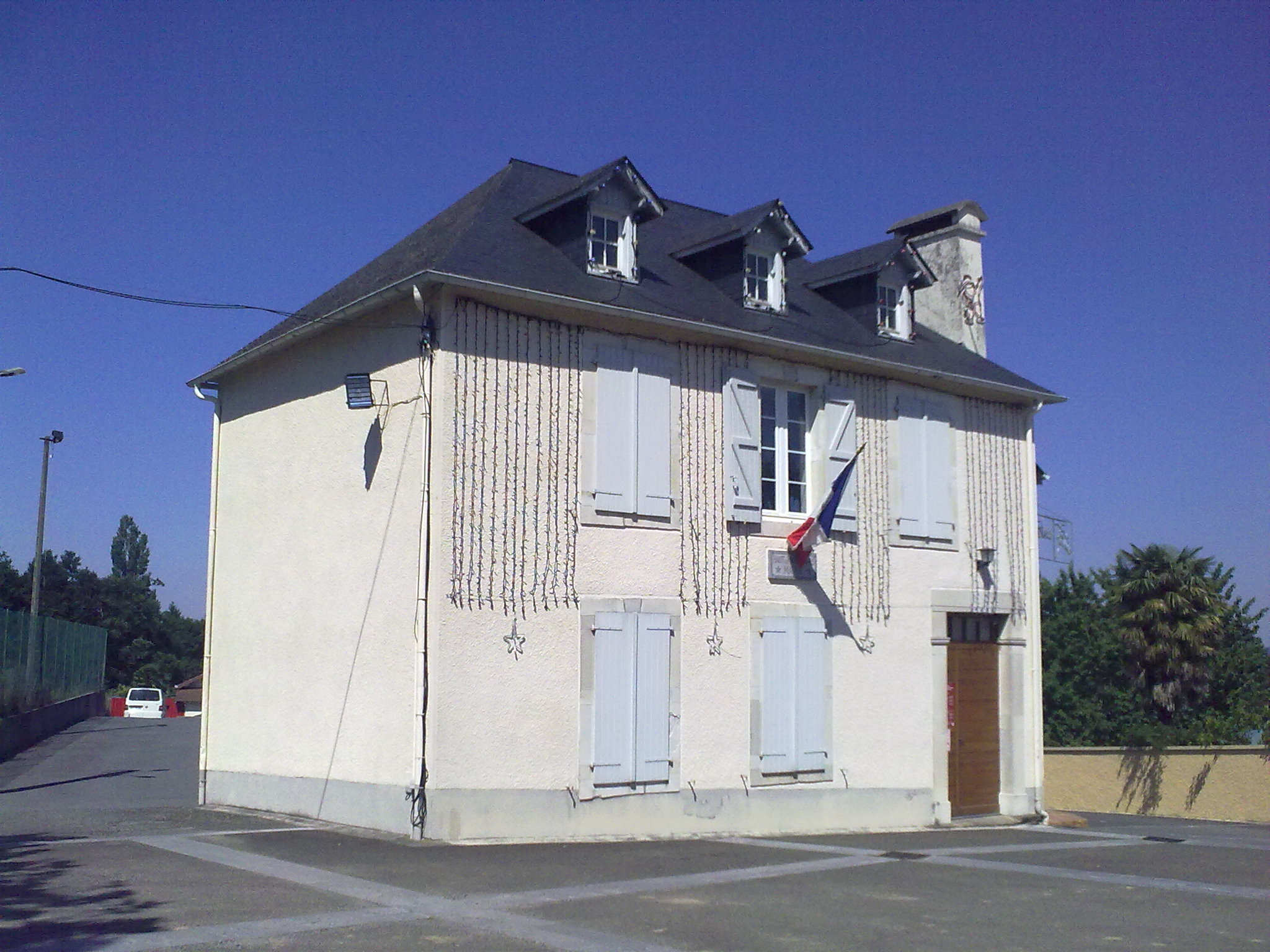 Mairie de Haut-de-Bosdarros.